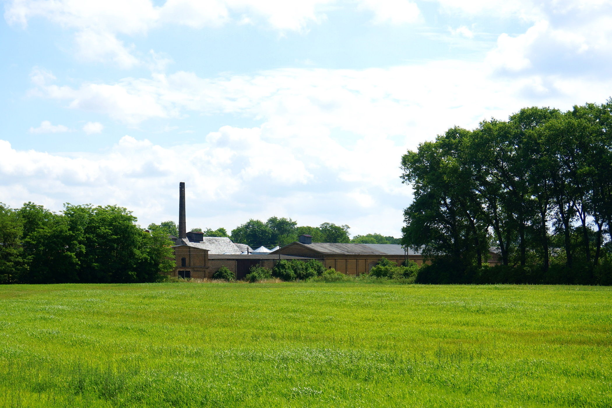 Policko, wieś w gminie Pszczew ( woj. lubuskie ). Zabudowania folwarczne.